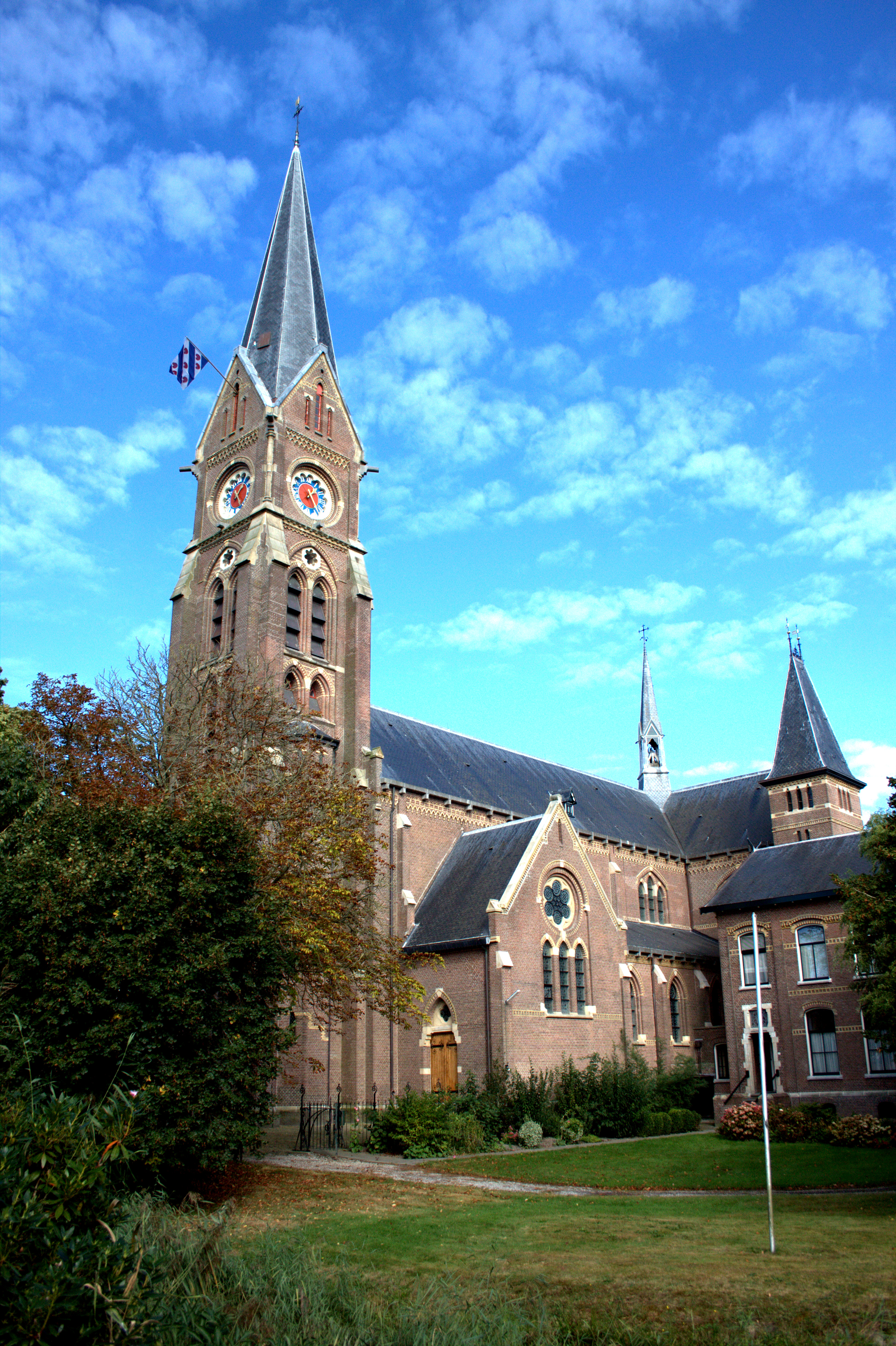 Blauwhuis, Vitusdijk 27 - Vituskerk - anno 1869